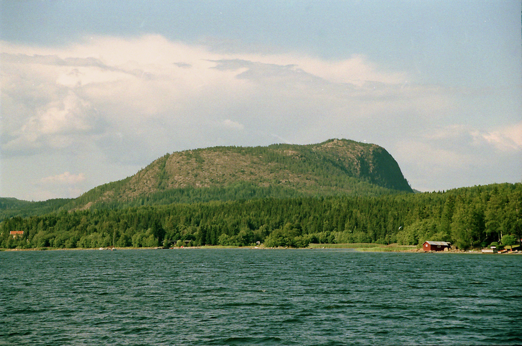 Skuleberget